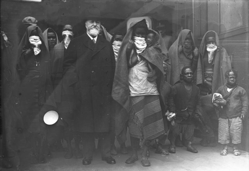 Lippenneger vom Stamme Sara-Kaba in Berlin! Die Ankunft der Lippenneger auf dem Anhalter Bahnhof in Berlin. In der Mitte der Direktor des Berliner Zoos Prof. Heck. Die Teller-Lippen haben die Negerfrauen mit Tüchern verdeckt.